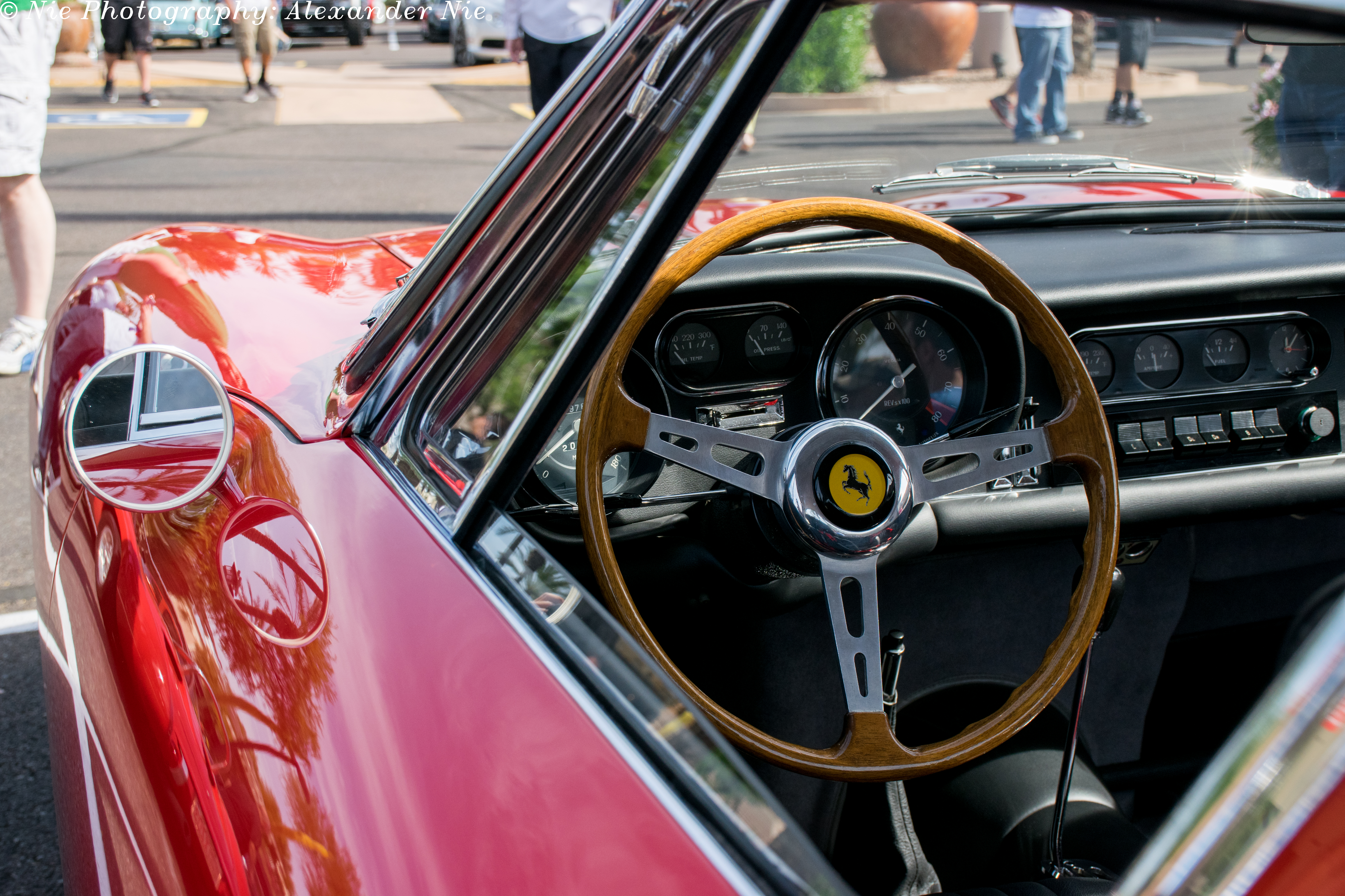 A rare Ferrari 275 GTB in beautiful condition.